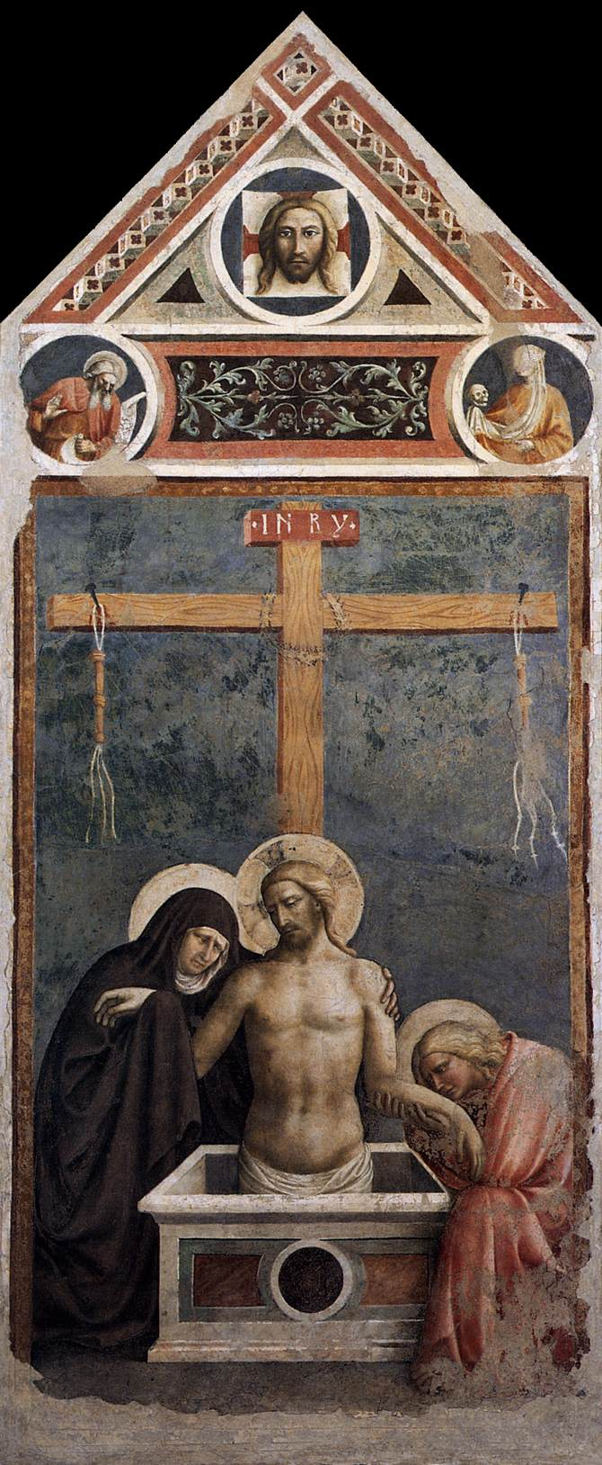 Pietà